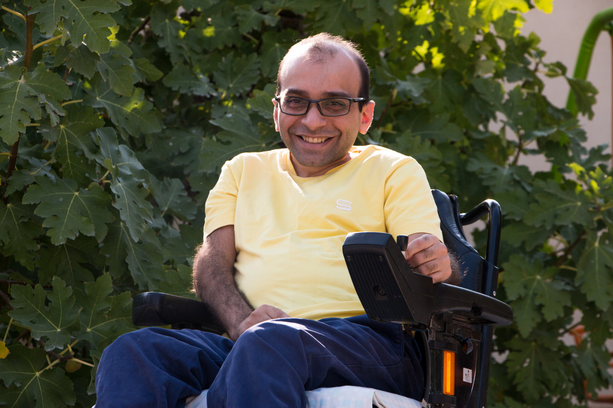 عبدالوهاب نظری در خانه پدری خود، گراش، عکس از محمدامین نوبهار